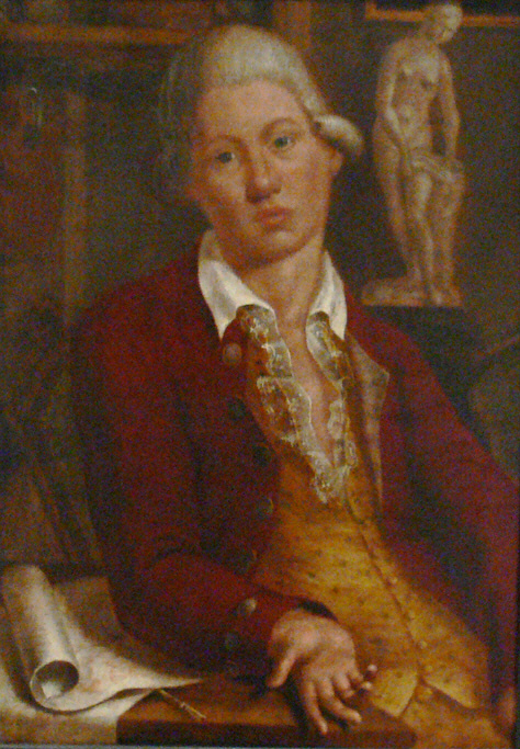 Selbstbildnis im Rokokokostüm